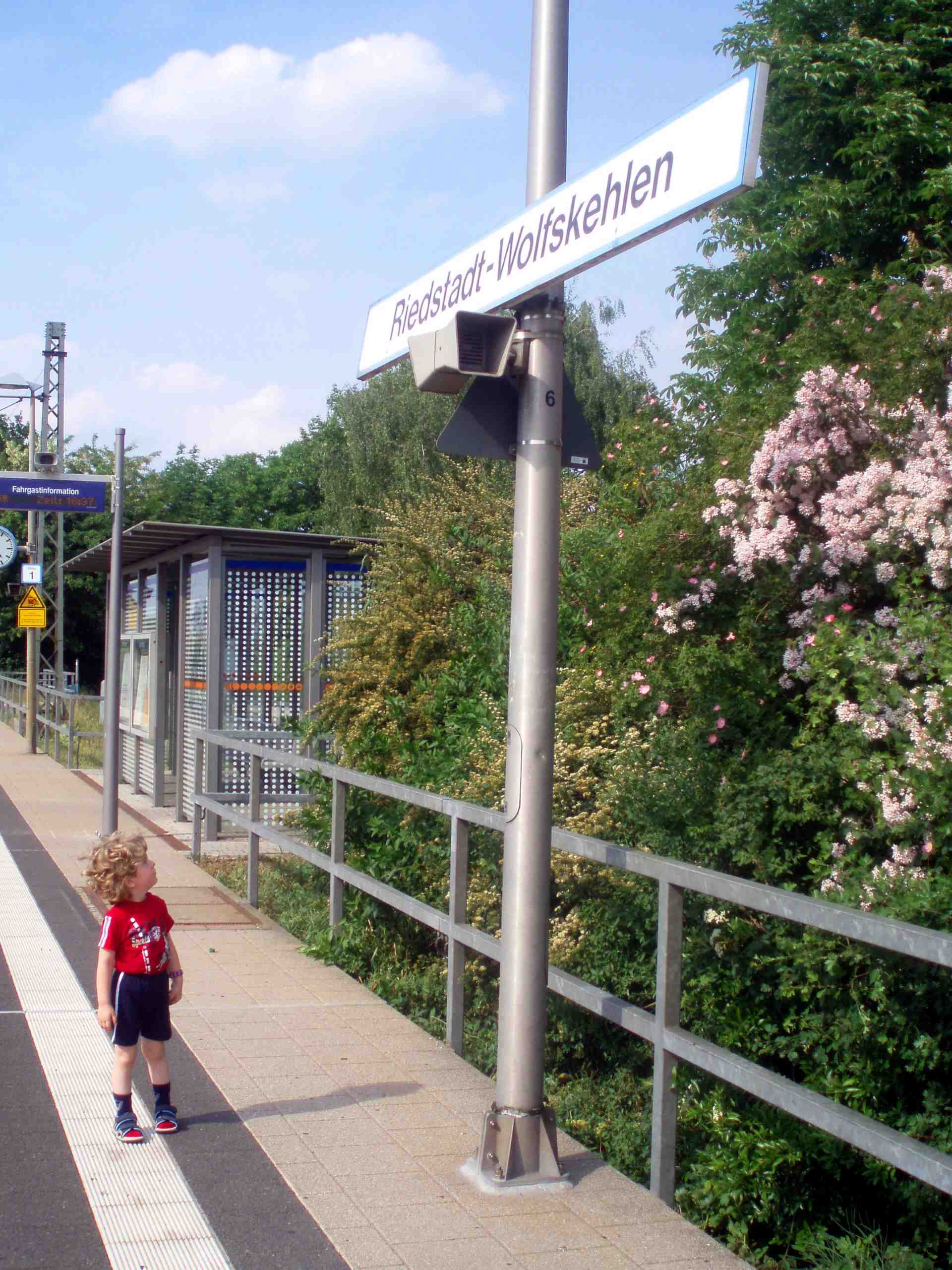 Bahnhof Riedstadt-Wolfskehlen